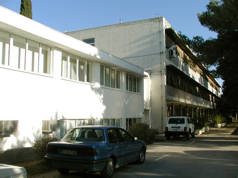 Zgrada Instituta za jadranske kulture u Splitu